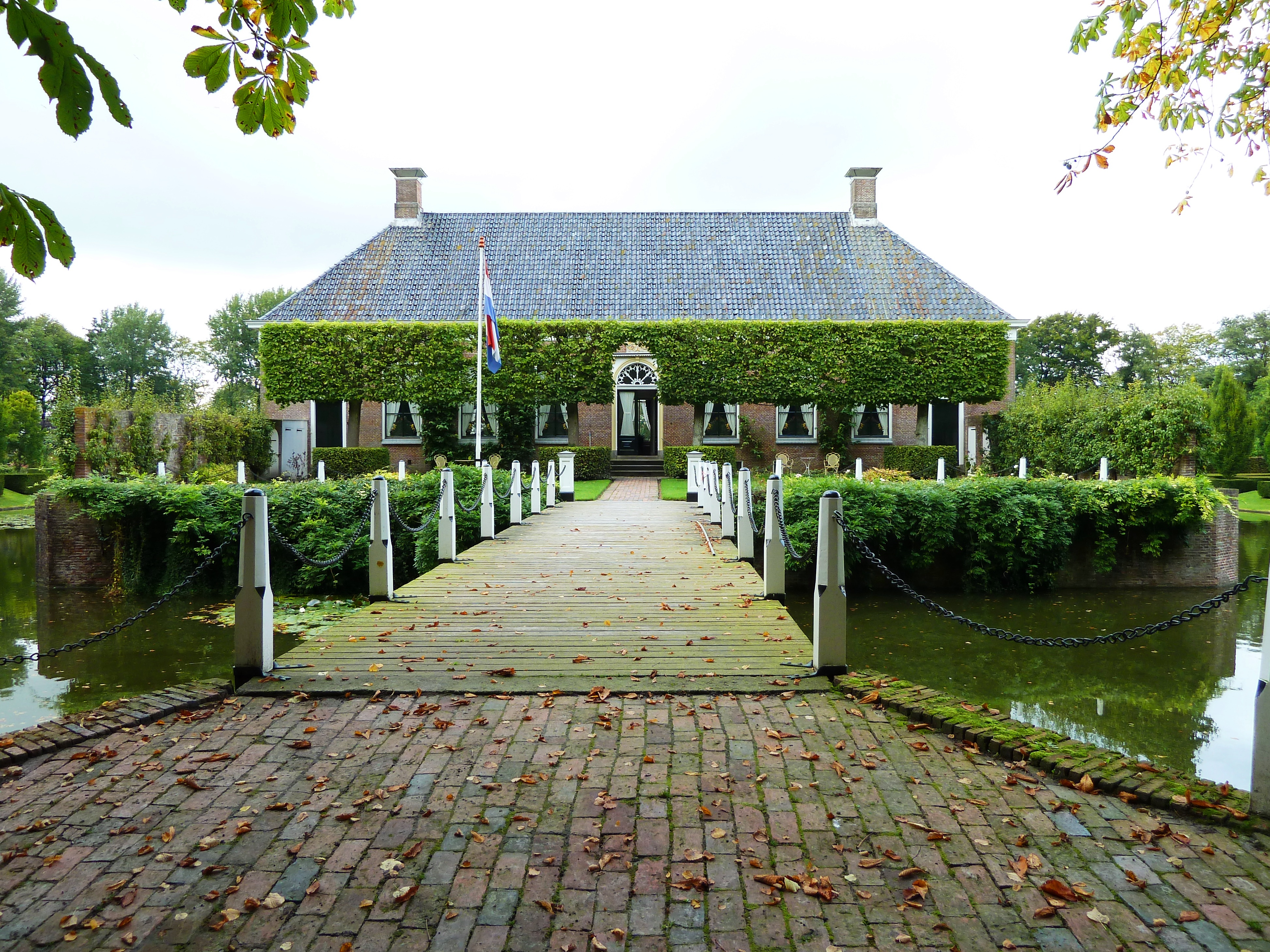 Borg Verhildersum, voorzijde.